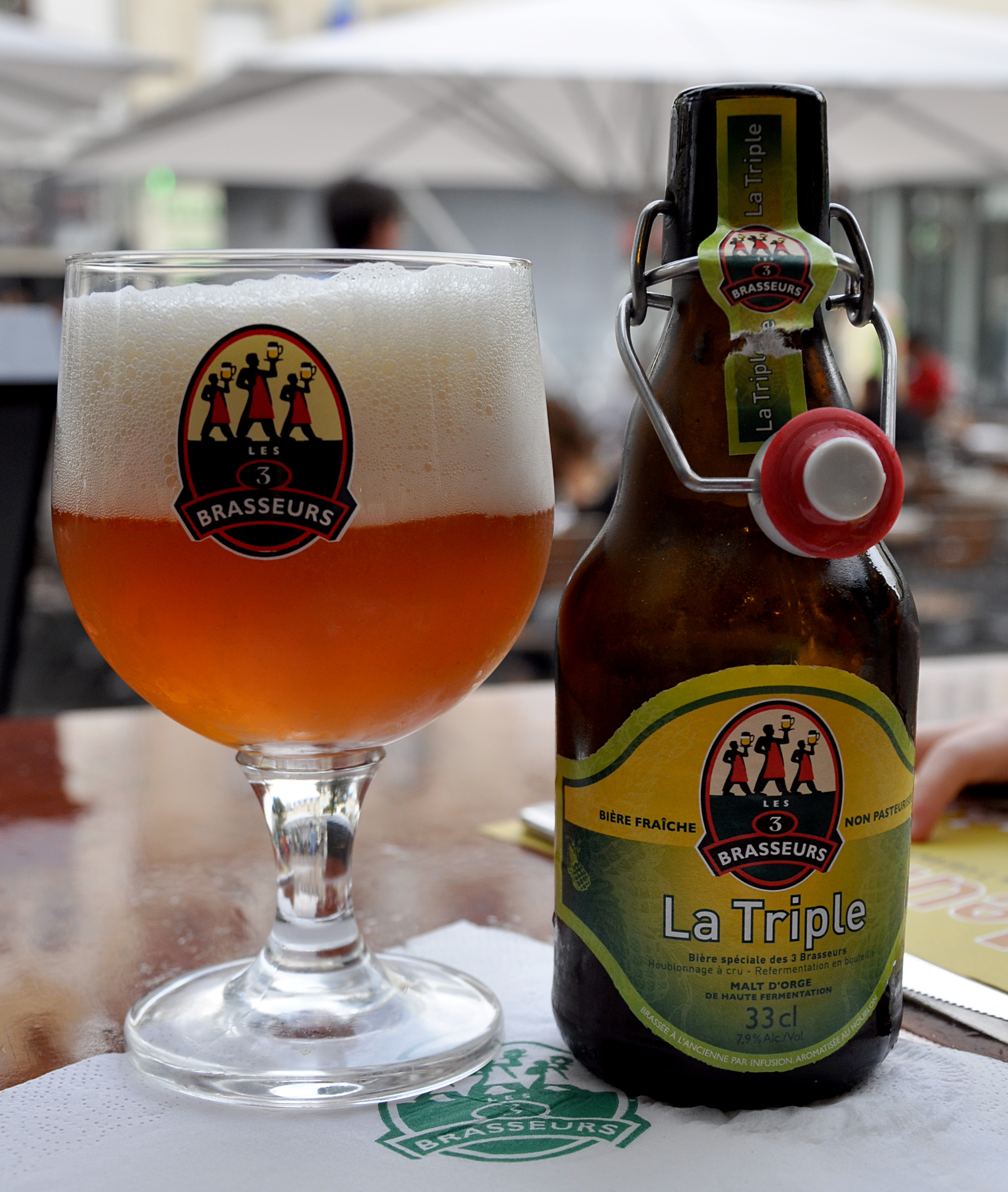 3 Brasseurs Triple